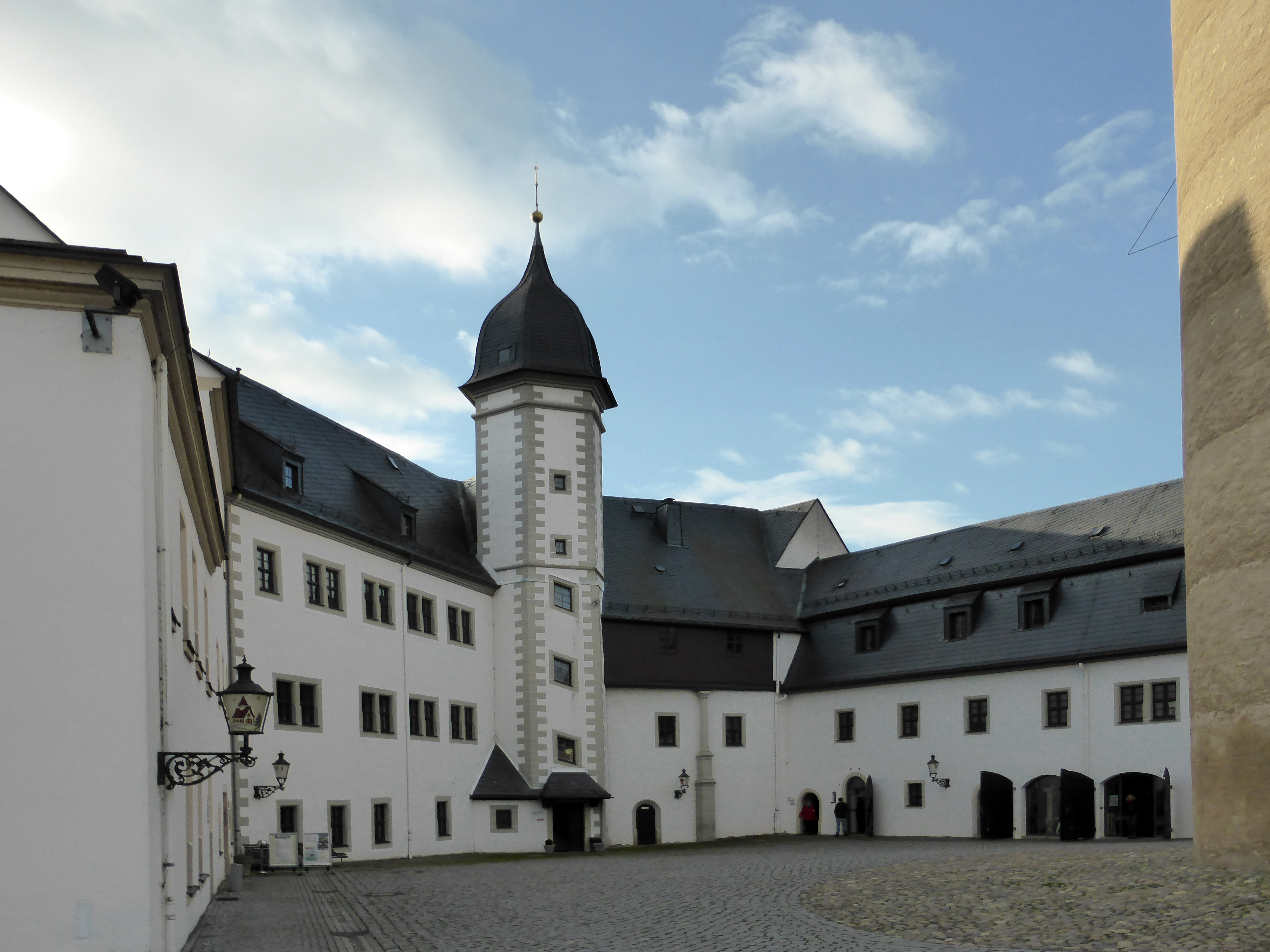 Innenhof mit Treppenturm („Schlanke Margarete“) - Schloss Wildeck, Zschopau - Sachsen.